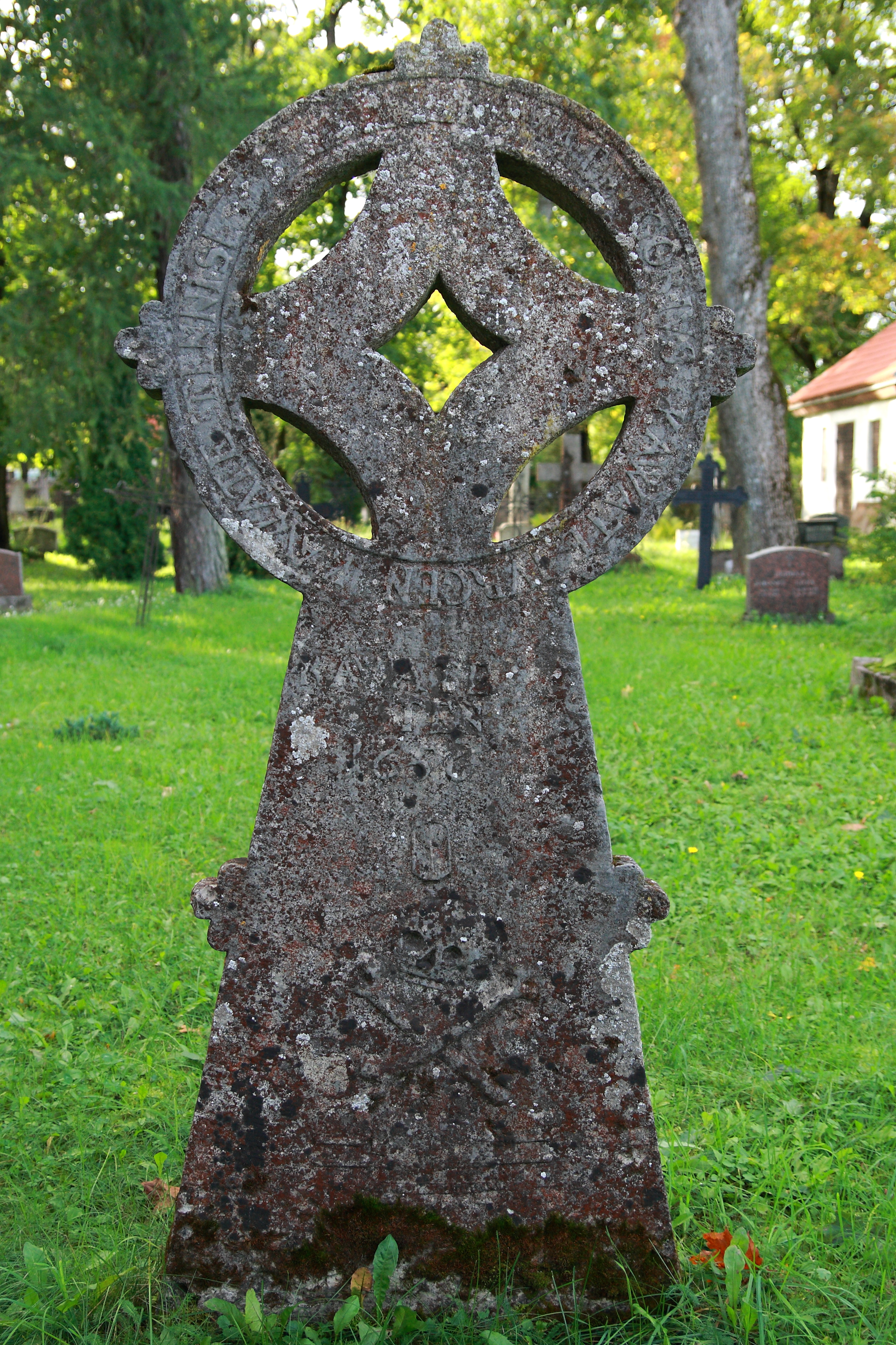 Ratasrist, 1656 (paas)